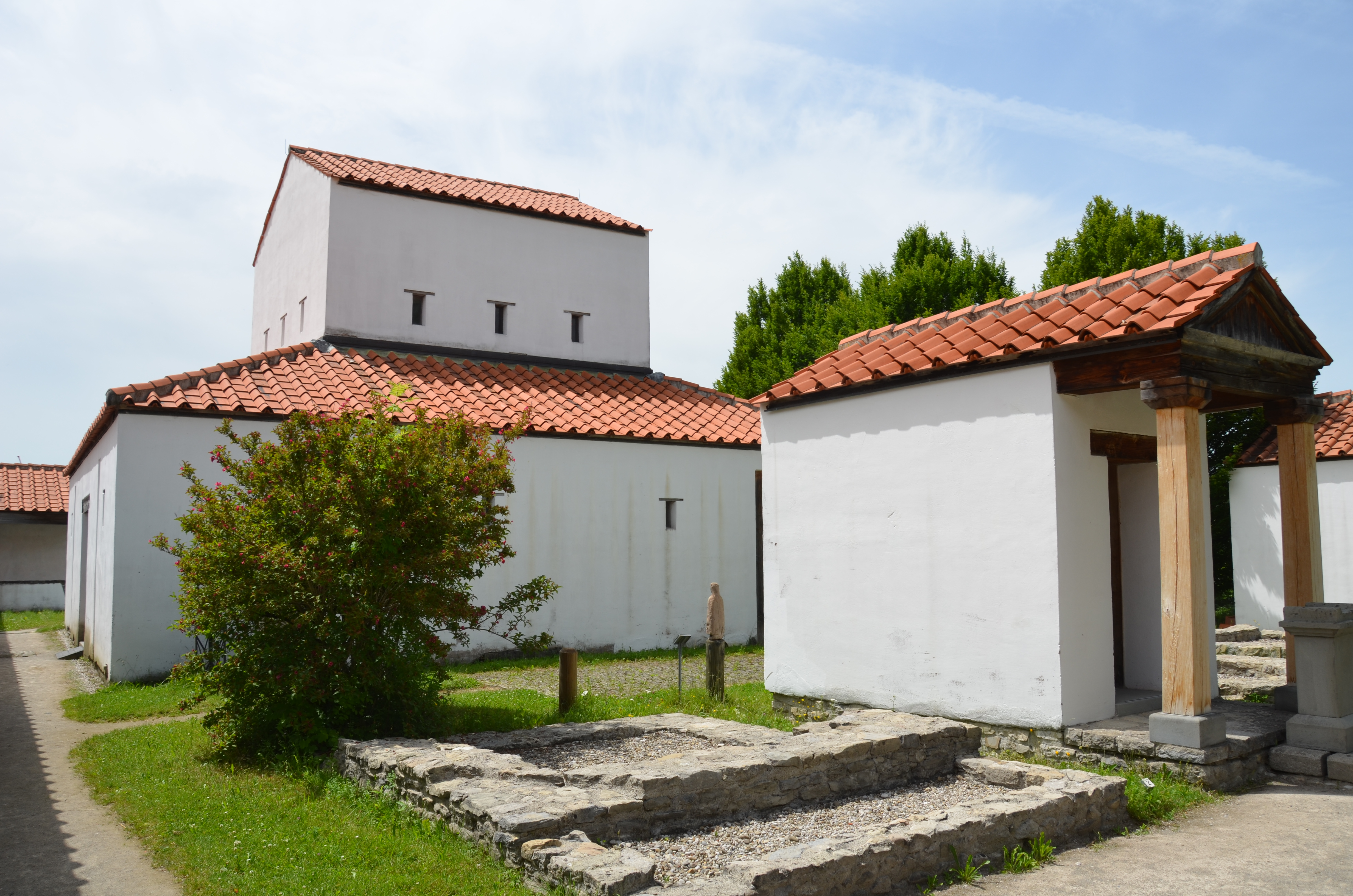 APC - Cambodunum